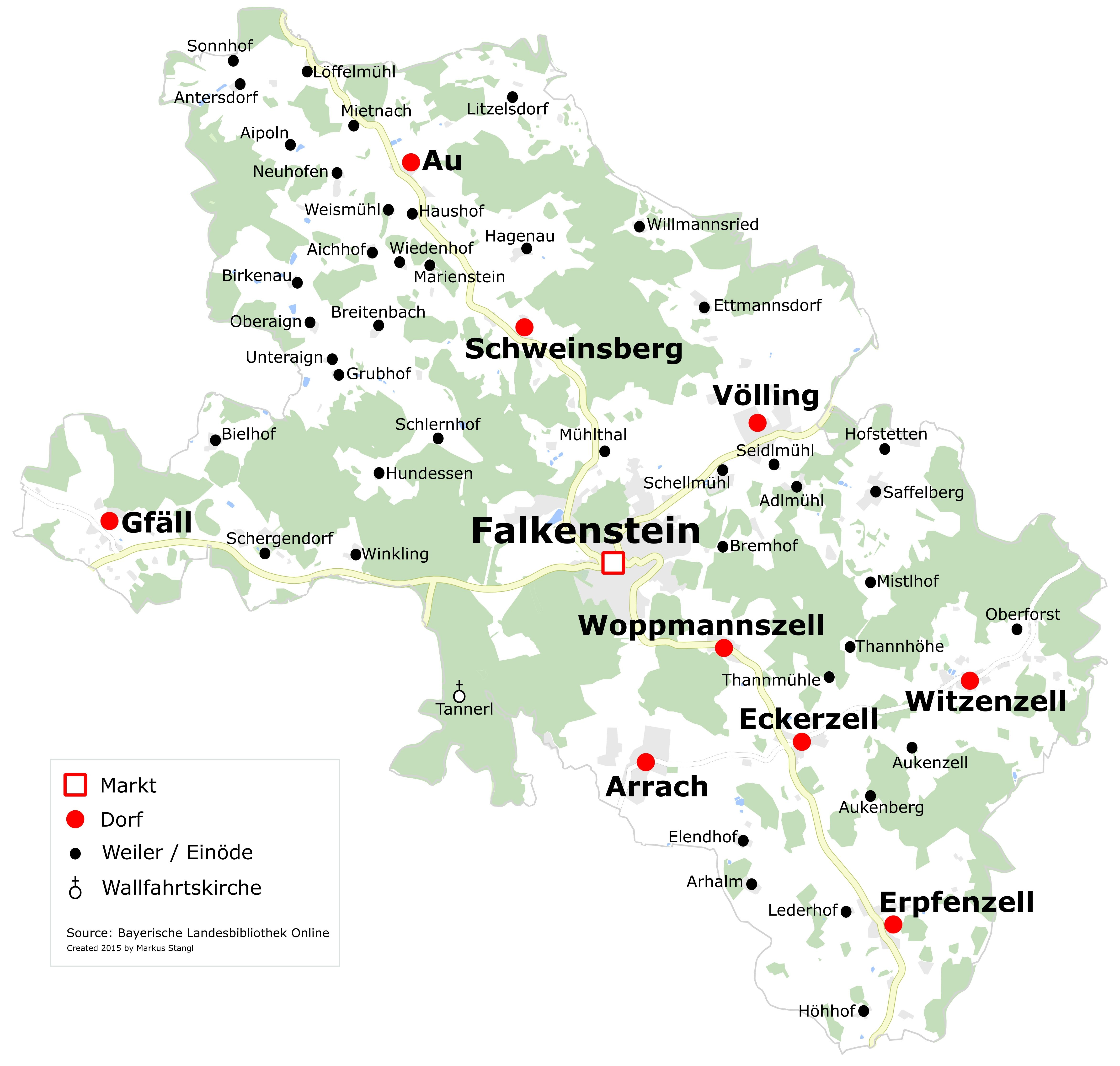 Gemeinde Falkenstein mit Ortsteilen